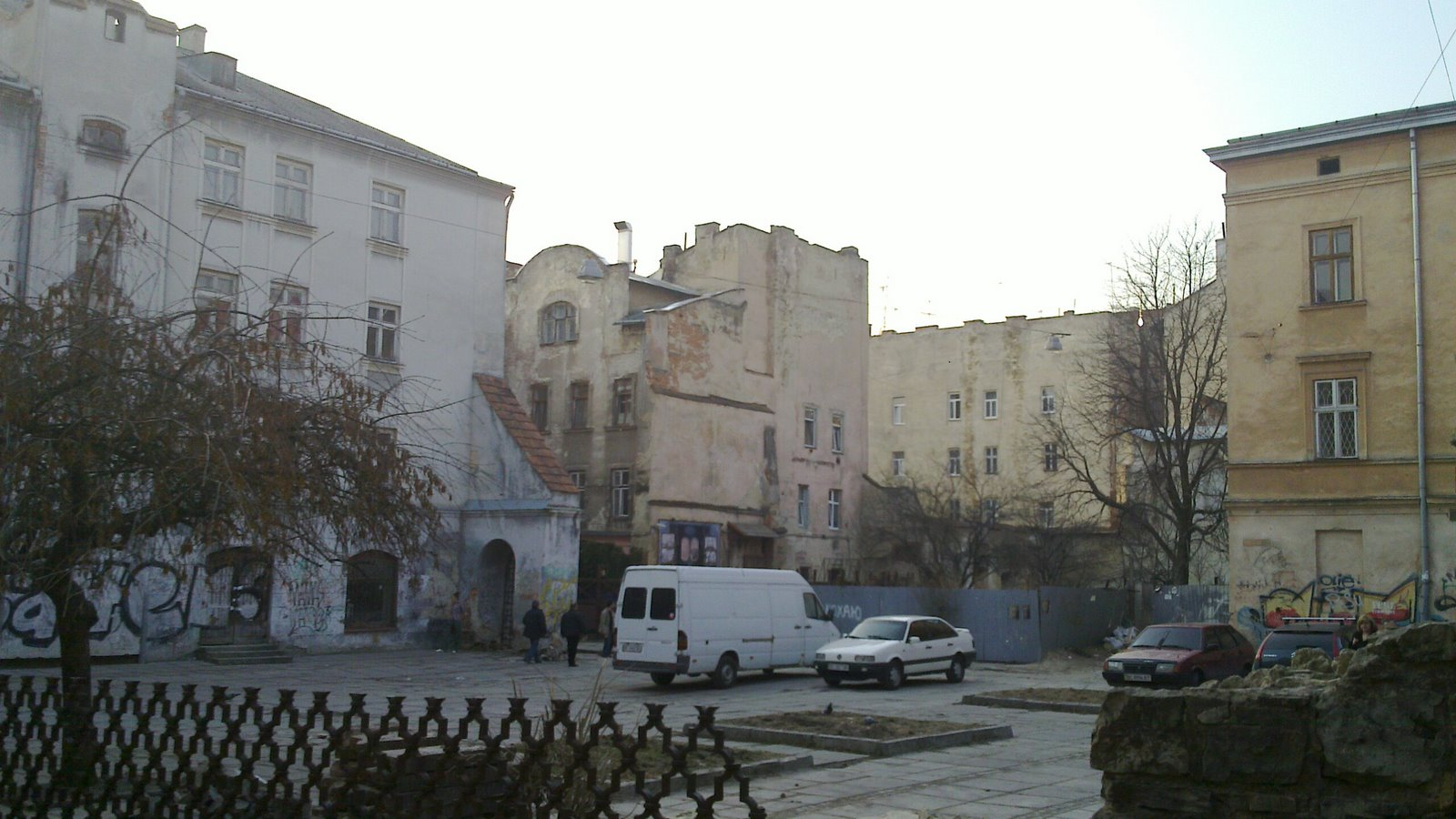 Плошадь синагог во Львове - место, где стояла Большая синагога, Большой Бейт-мидраш и синагога Золотой Розы.